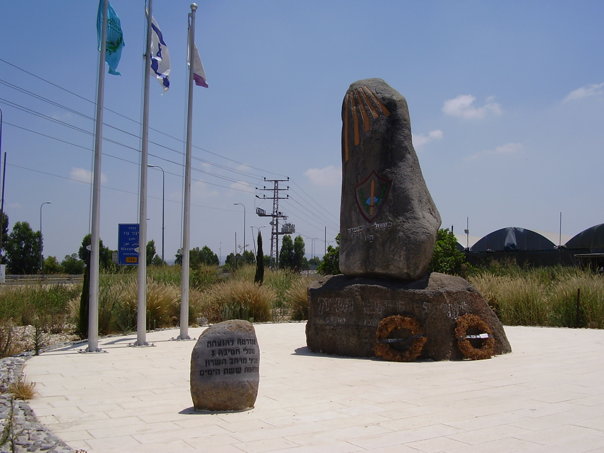 אנדרטה לחטיבה 5 במלחמת ששת הימים בצומת ניצני עוז